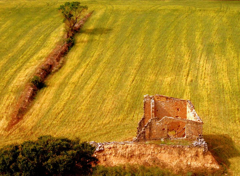 Campos de cultivo del pueblo de Rocallaura, cerca del monasterio de Vallbona de les Monges (Ruta del Cister). Si quereis disfrutar de unos paisajes maravillosos y de una tranquilidad inaudita os recomiendo recorrer los caminos que rodean el monasterio, en la comarca de Urgell.